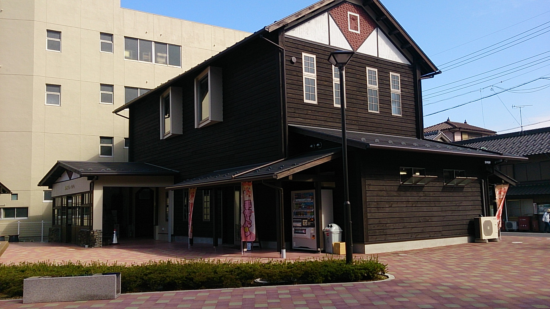 ホーム側からの撮影。